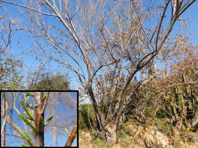 Tamarix dalmatica al Jardí Botànic de Barcelona.